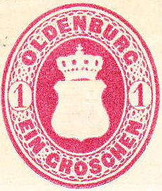 Traditionelle Briefmarke des Landes Oldenburg (heute Teil von Niedersachsen/Deutschland)